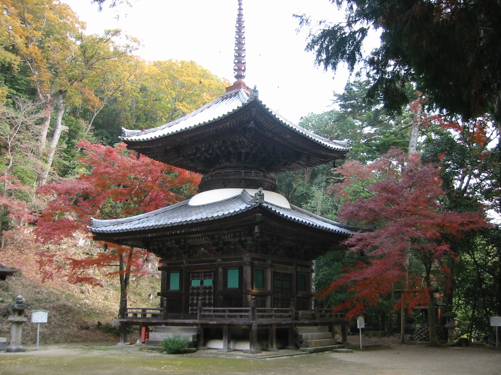 大谿寺伽耶院 多宝塔